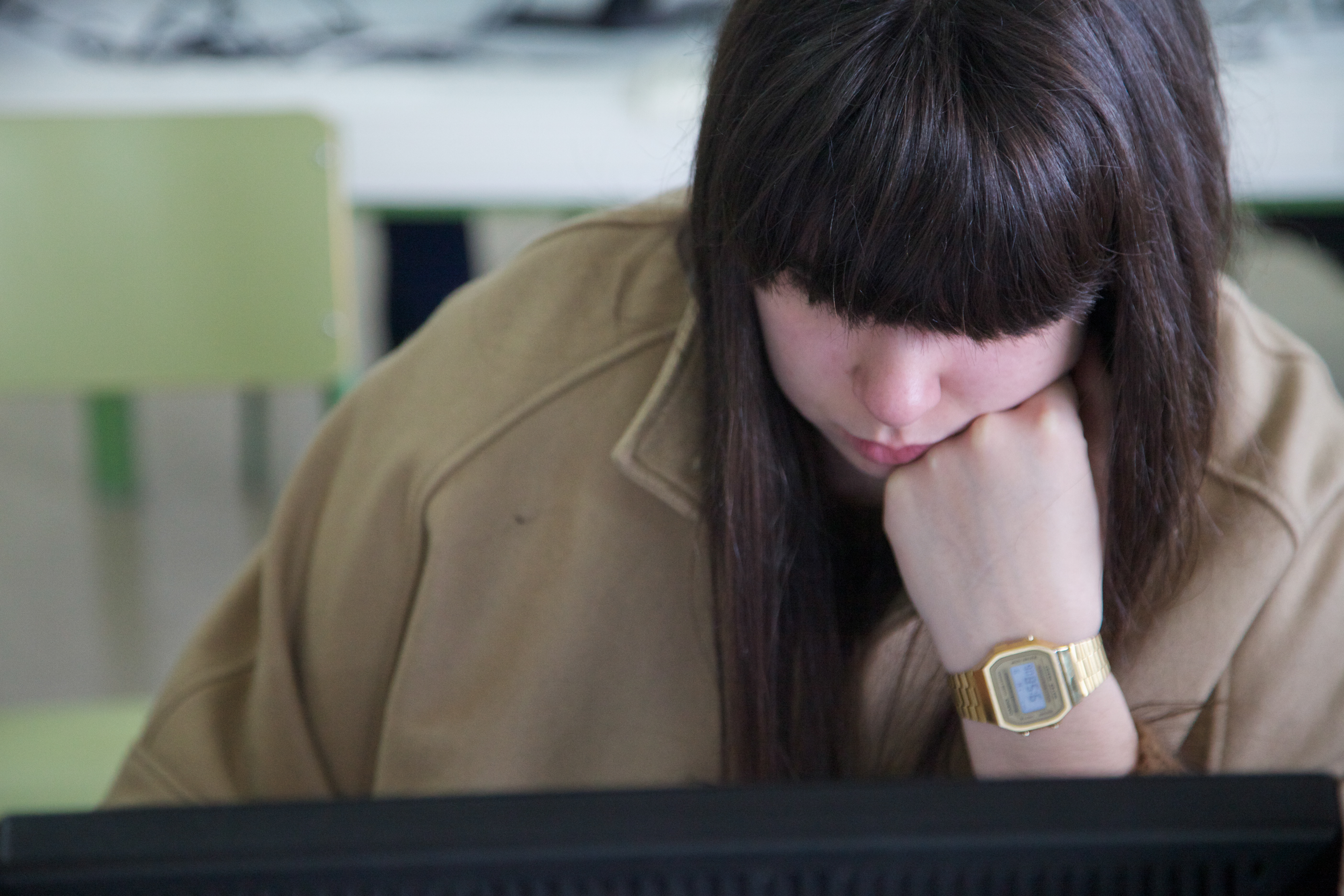 Concurso de Cultura Clásica Odisea. Foto tirada na Biblioteca do IES "Manuel García Barros", A Estrada, Galiza